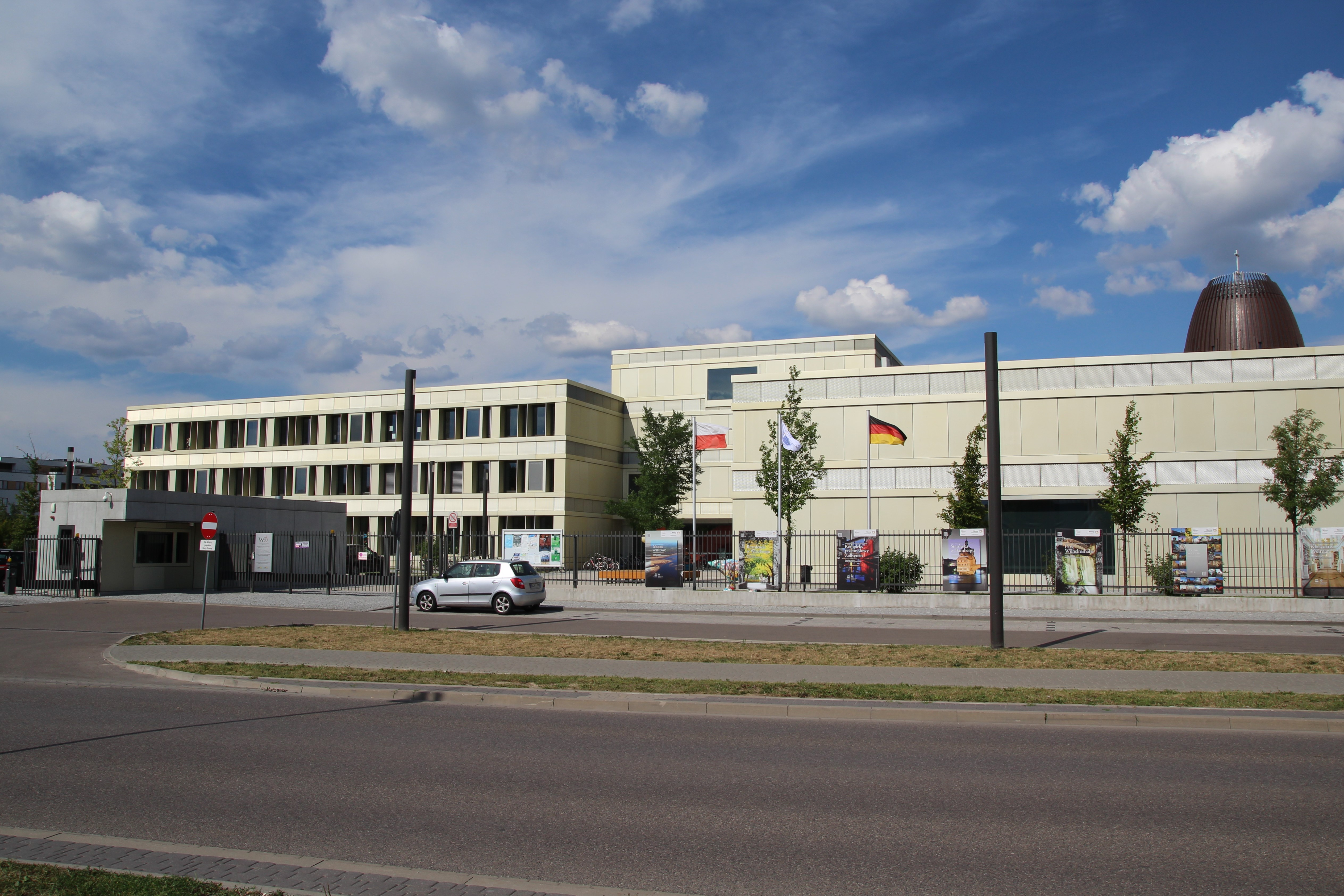 Ledóchowskiej, WBS, entrance